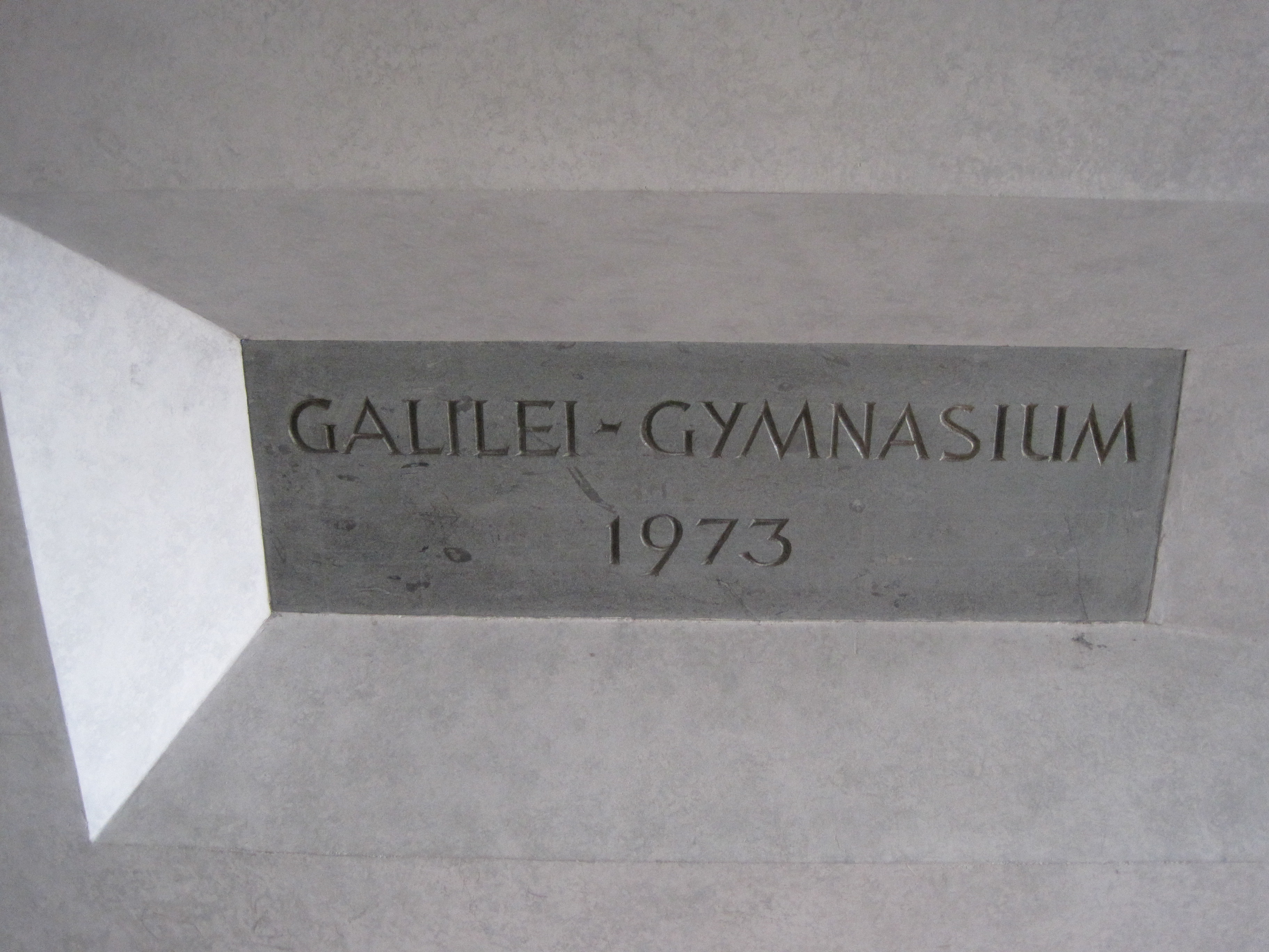 Das Foto zeigt den Schriftzug "Galilei-Gymnasium 1973" im Eingangsbereich der gleichnamigen Hammer Schule.